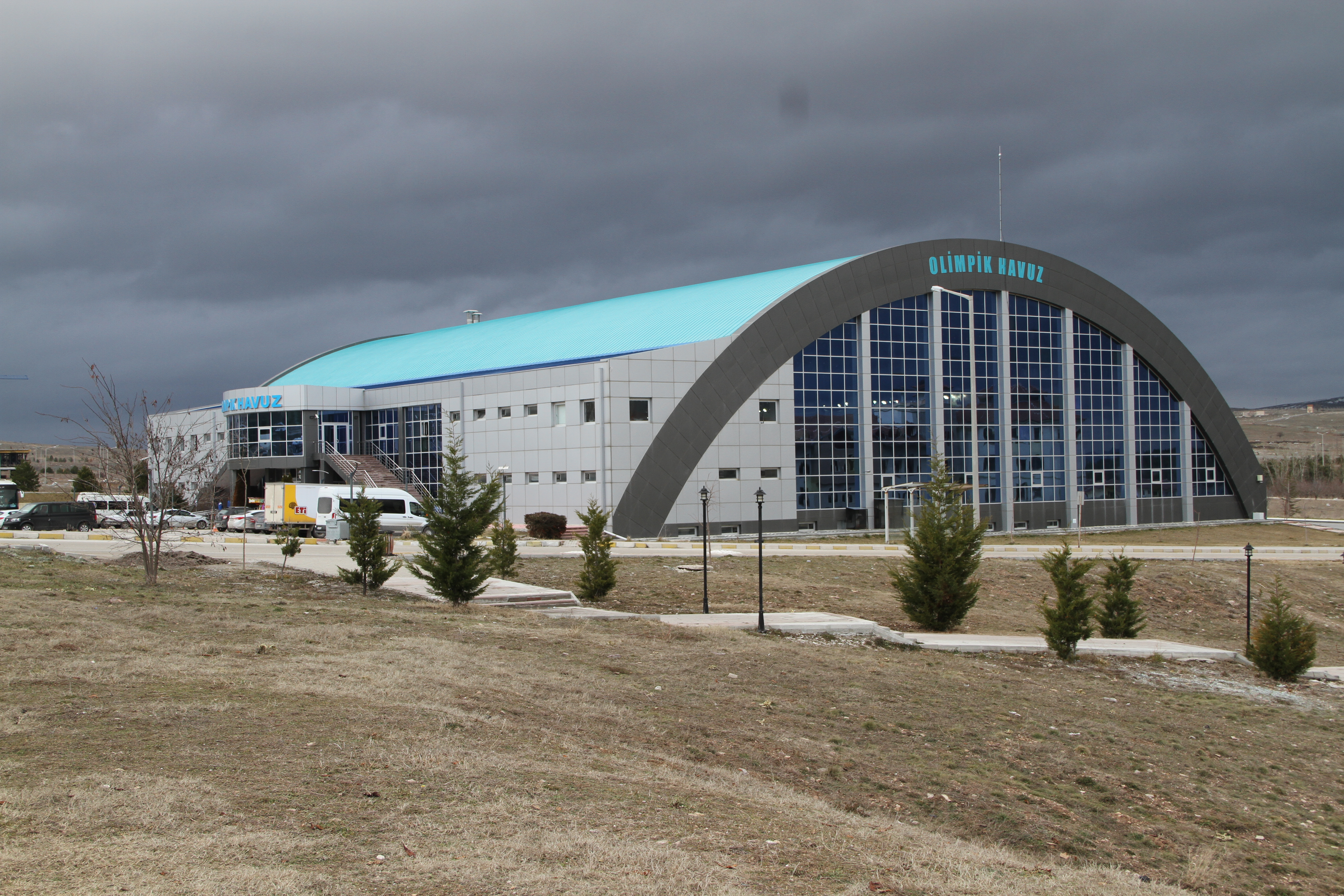 DPÜ'nün Evliya Çelebi Yerleşkesi'ndeki Olimpik Yüzme Havuzu